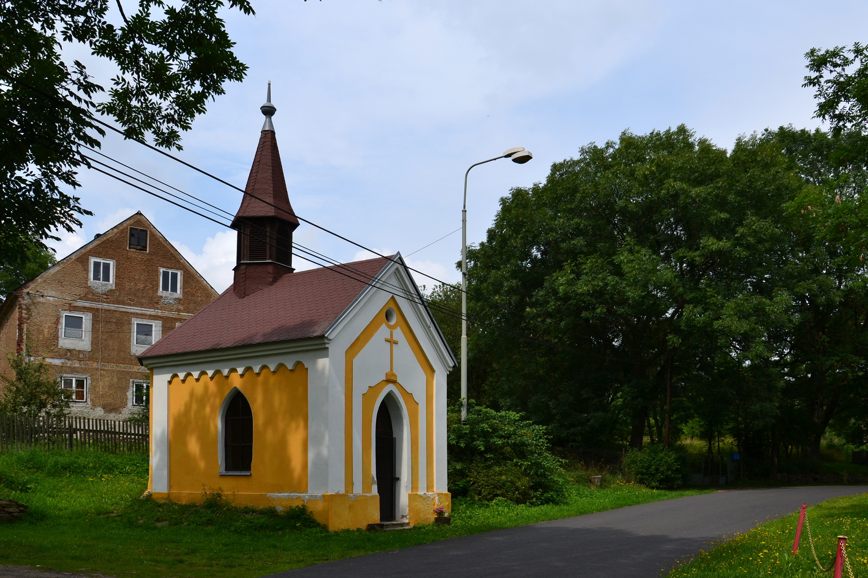 Domašín - kaple